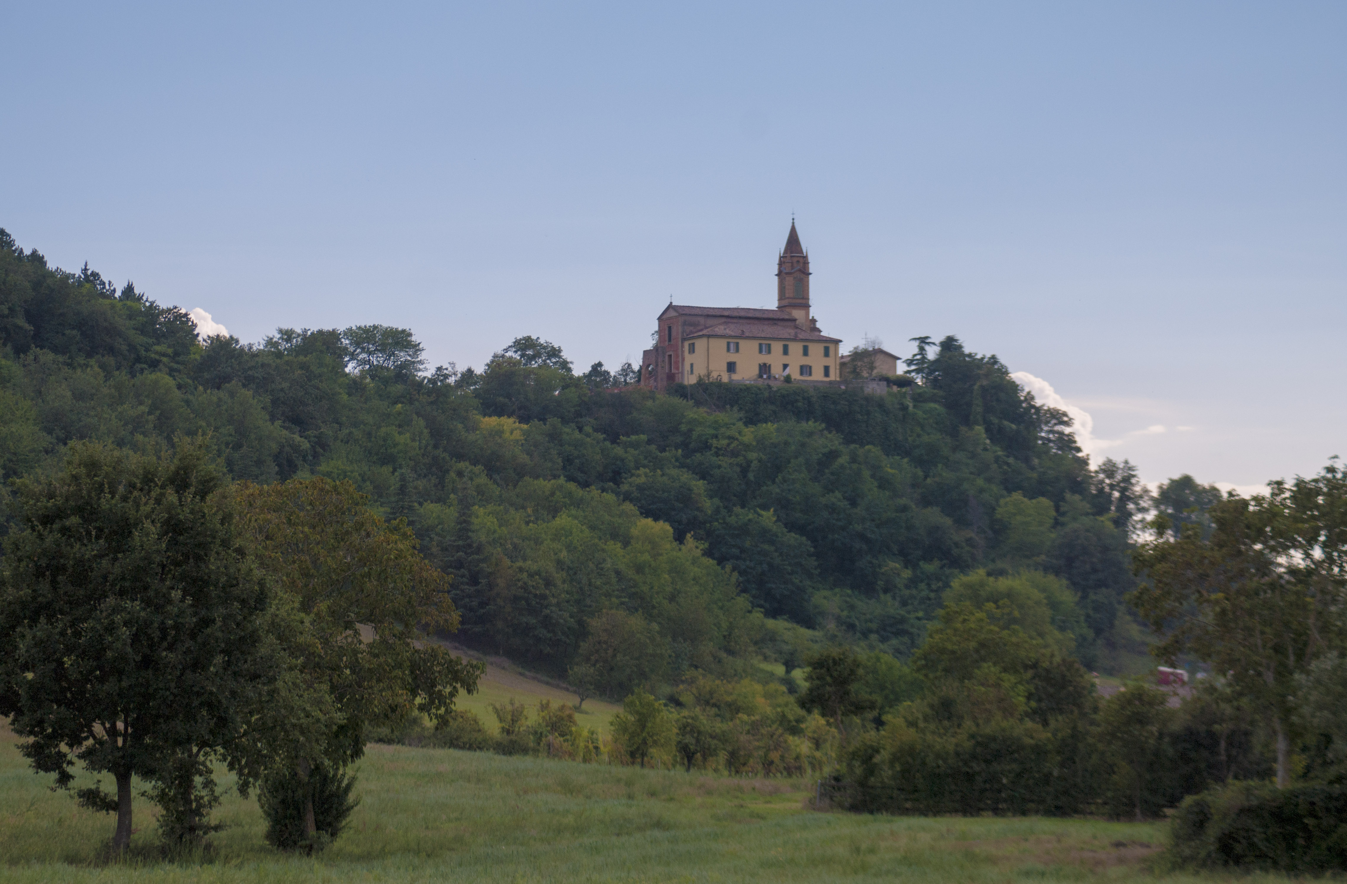 Chiesa di San Biagio. It's the best skyline of Castel de' Britti, San Lazzaro di Savena, Bologna, Italy This is a photo of a monument which is part of cultural heritage of Italy.